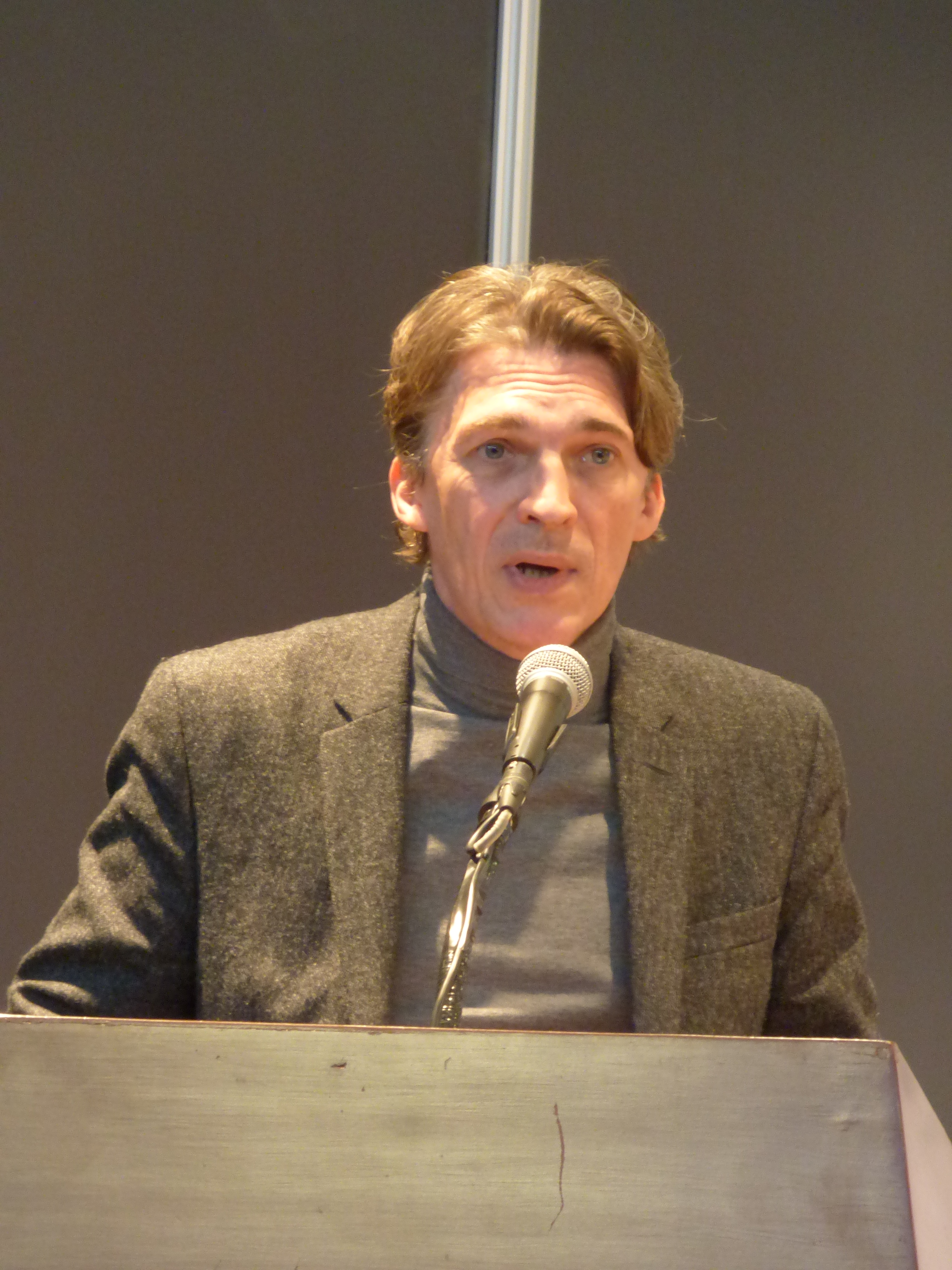 Nicolas Bourriaud en el MECA, Aguascalientes, México